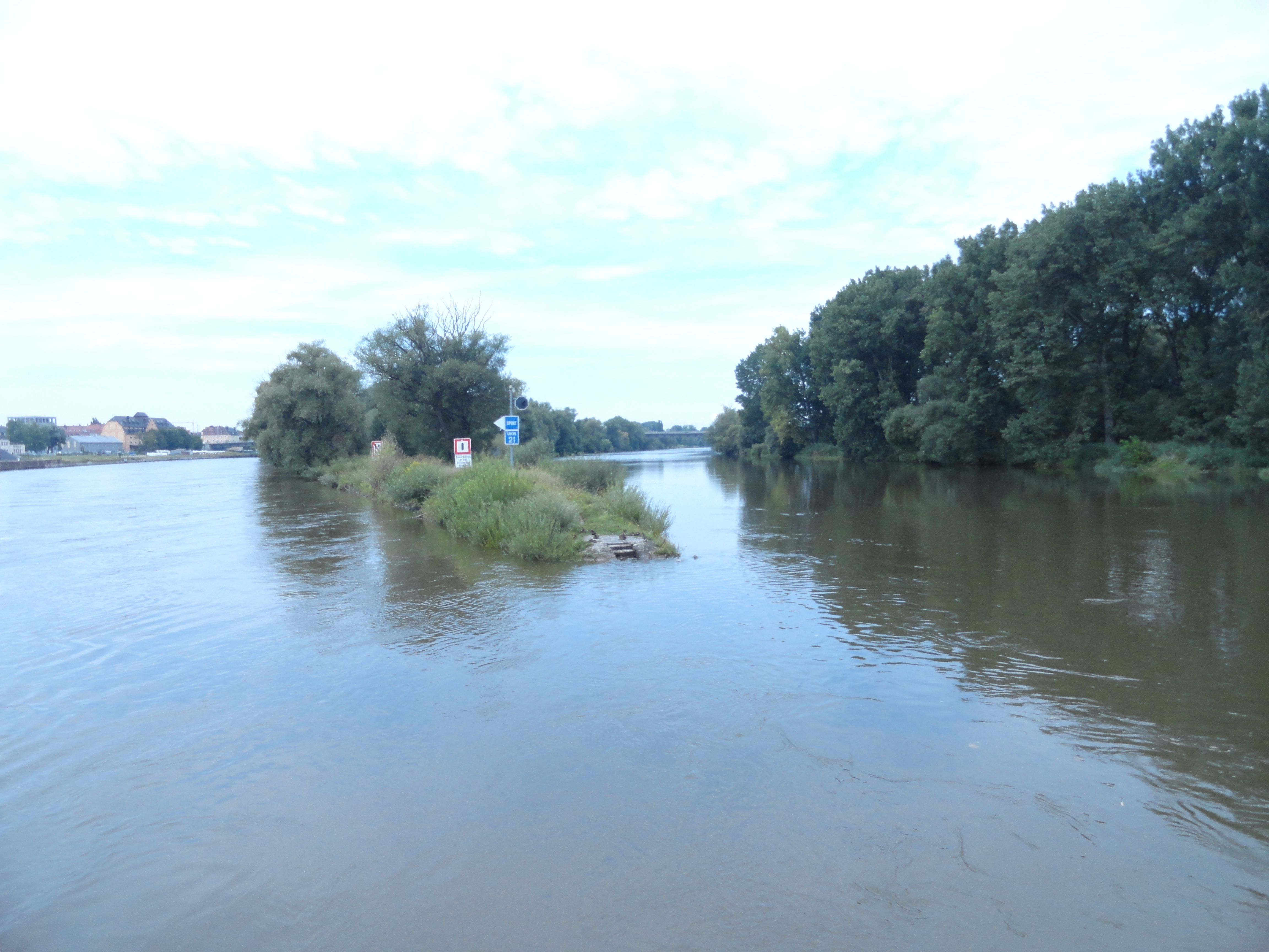 Lazarettspitze in Regensburg; Stelle der Vereinigung von Donau-Südarm und Donau-Nordarm in Regensburg